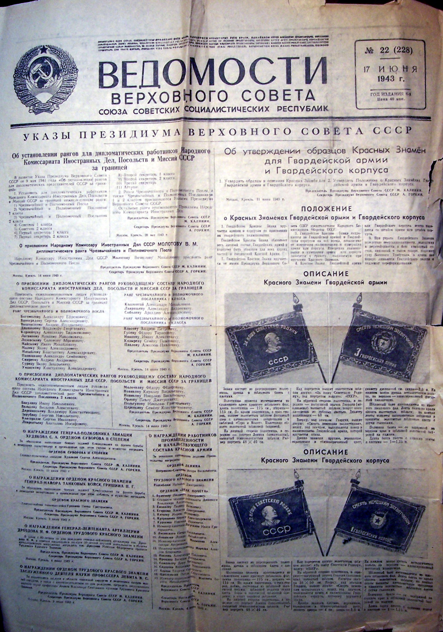 Обложка «Ведомостей Верховного Совета СССР»